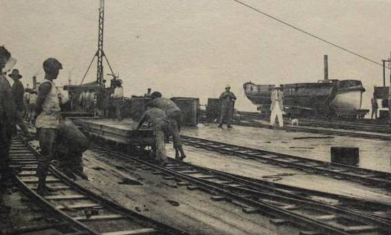 Dahoey - Cotonou - Sur le Wharf